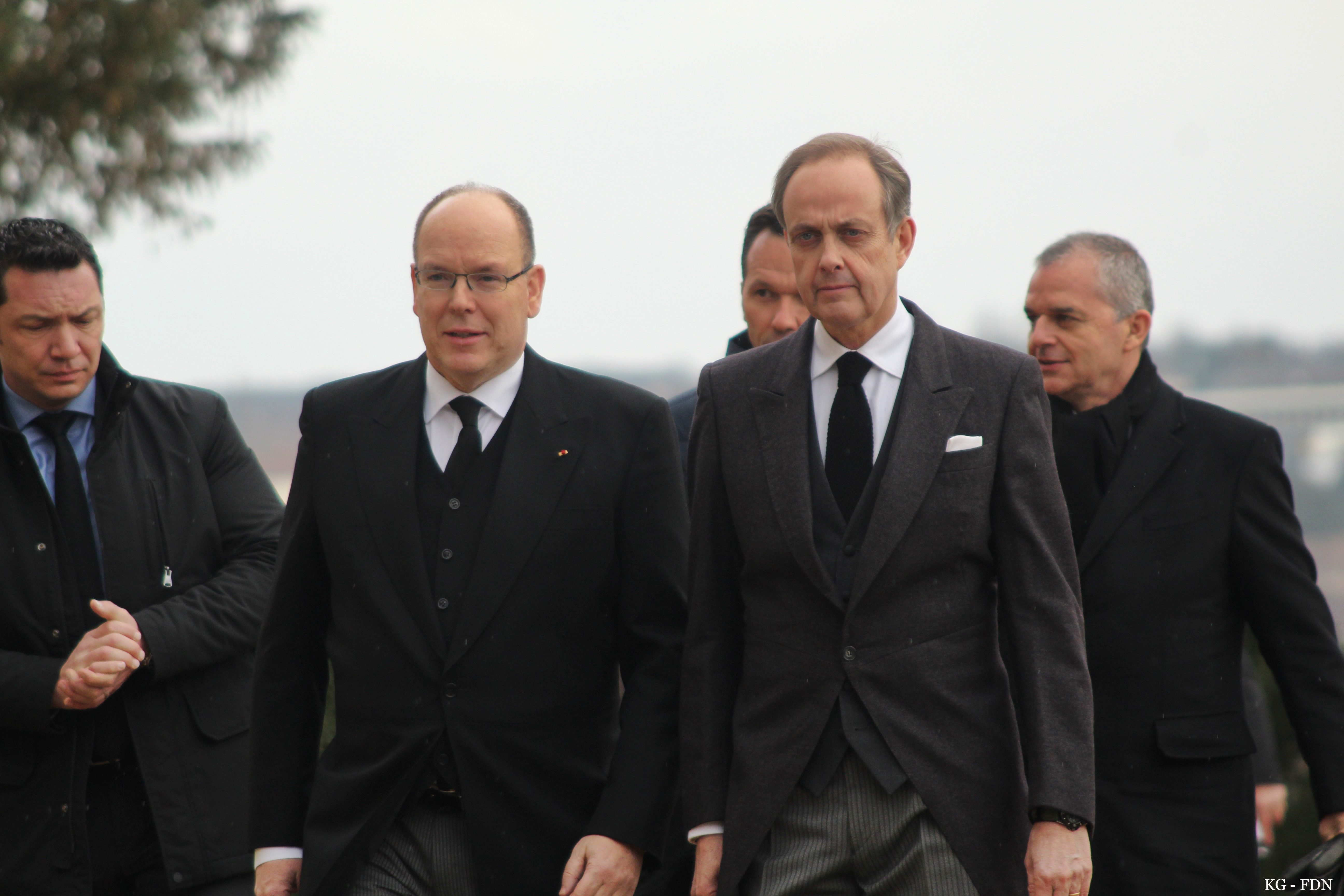 Funérailles du comte de Paris, Jean d'Orléans recevant le prince Albert II de Monaco, à Dreux.